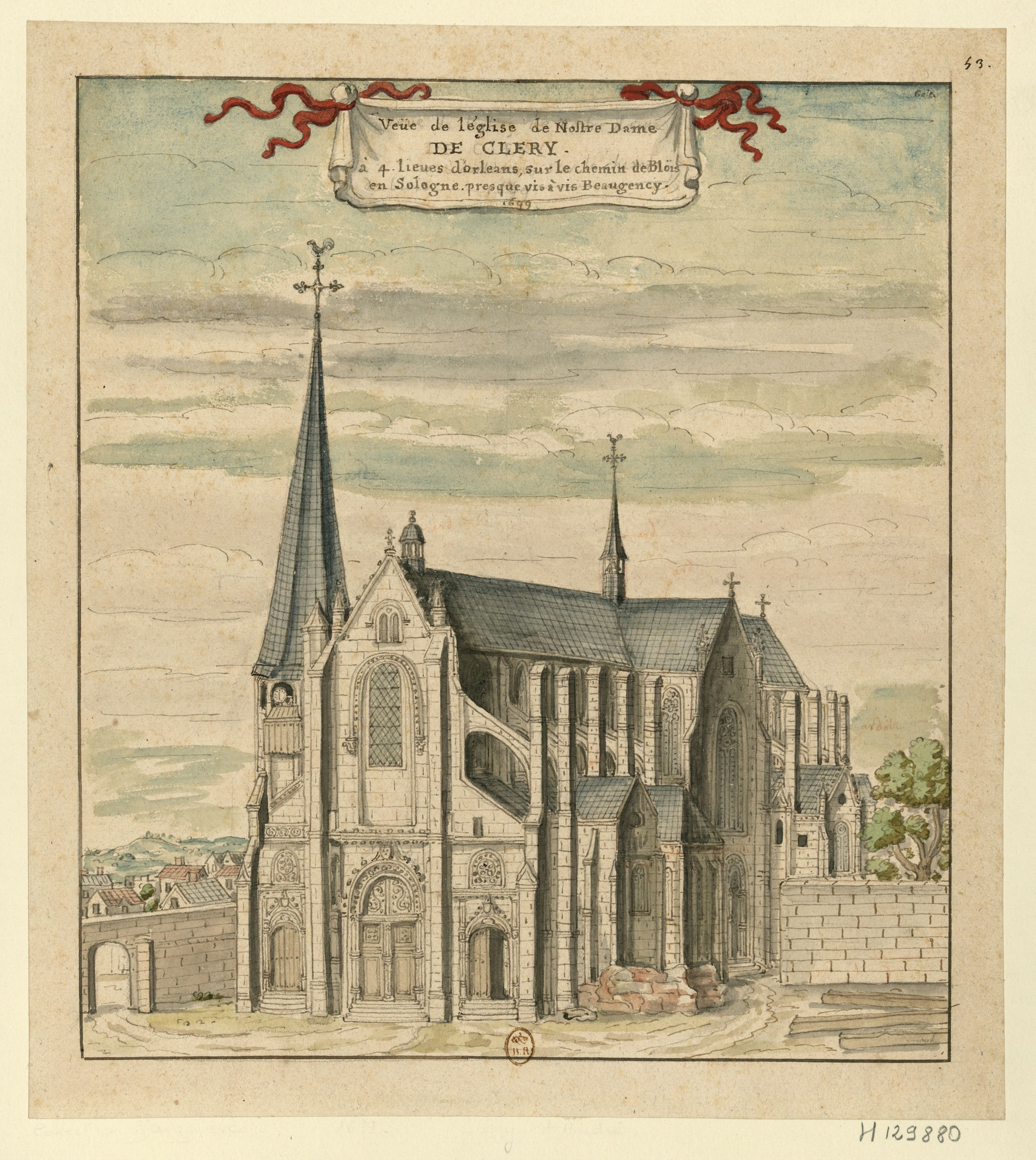 Basilique Notre-Dame de Cléry-Saint-André en 1699. « Veue de l'église de Notre DameDE CLERYà 4 lieues d'Orléans, sur le chemin de Bloisen Sologne presque vis à vis Beaugency.1699 »